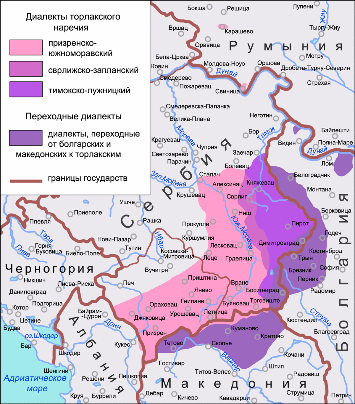 Карта распространения говоров торлакского (призренско-тимокского) диалекта. Источники: Lisac J. Hrvatski dijalekti i govori štokavskog narječja i hrvatski govori torlačkog narječja // Hrvatska dijalektologija 1. — Zagreb: Golden marketing — Tehnička knjiga, 2003. — P. 160—161 (Karta 4. Dijalektološka karta štokavskog narječja). — ISBN 953-212-168-4 Browne W. Serbo-croat // The Slavonic Languages / Comrie B., Corbett G. — London, New York: Routledge, 1993. — P. 383 (Map 7.1. Serbo-Croat dialects). — ISBN 0-415-04755-2